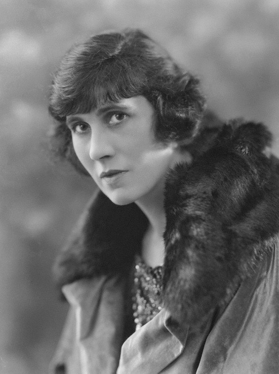 Hilda Moore